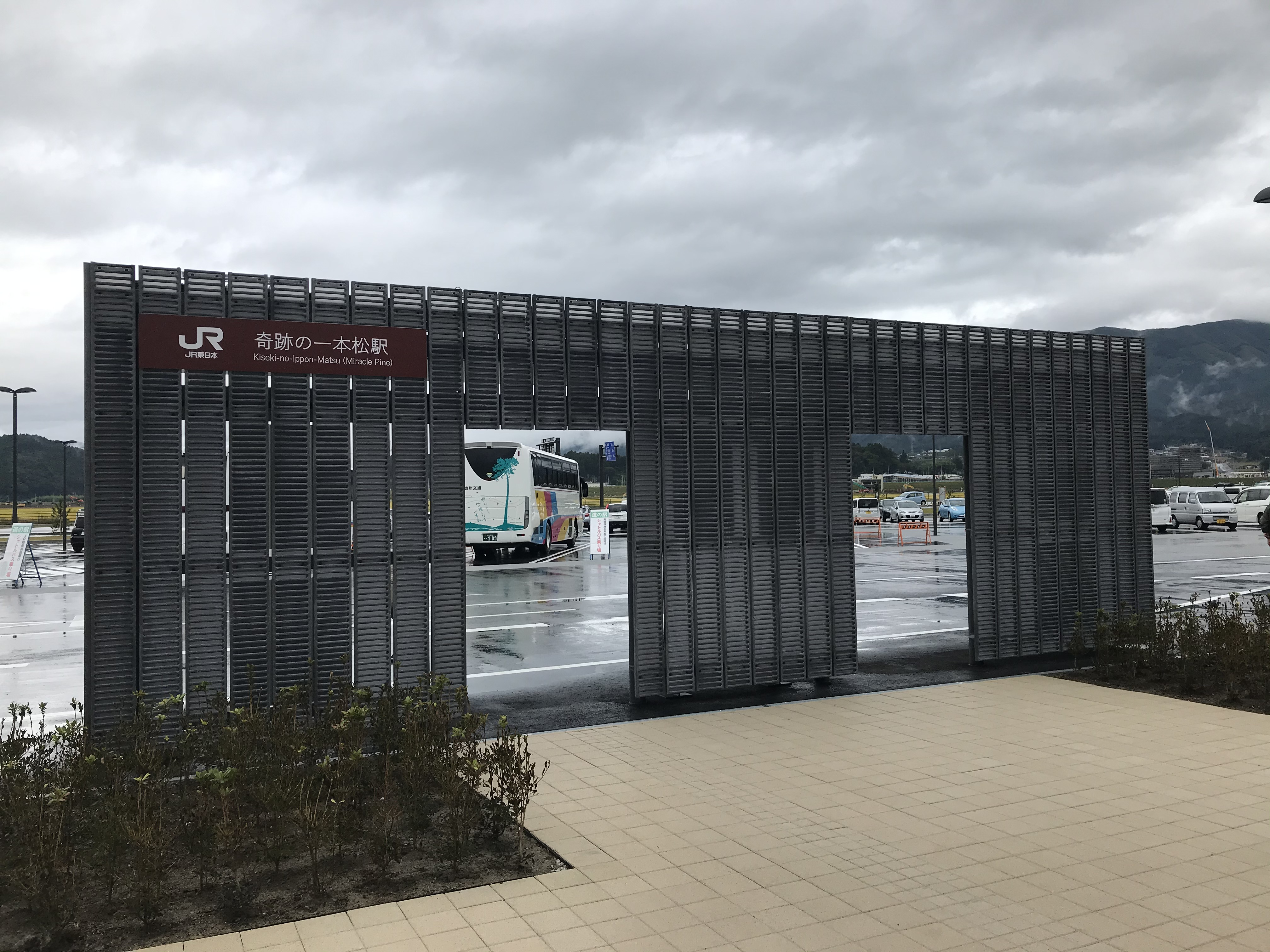 2019年9月23日撮影